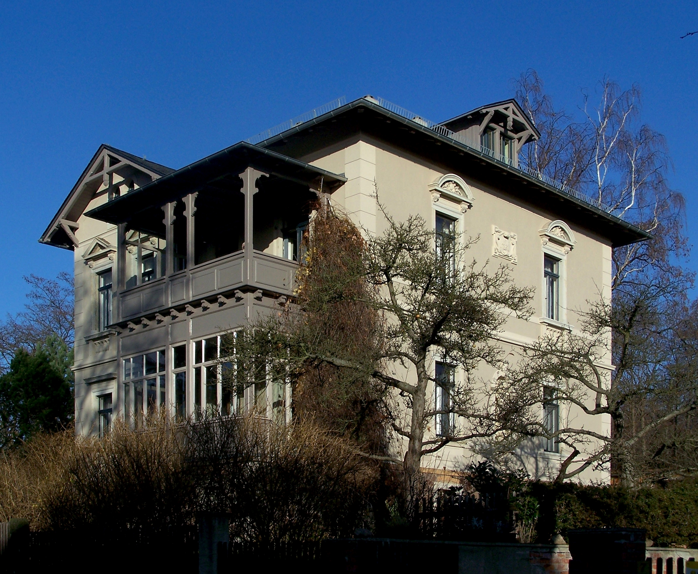 Wettinstr. 9 in Radebeul